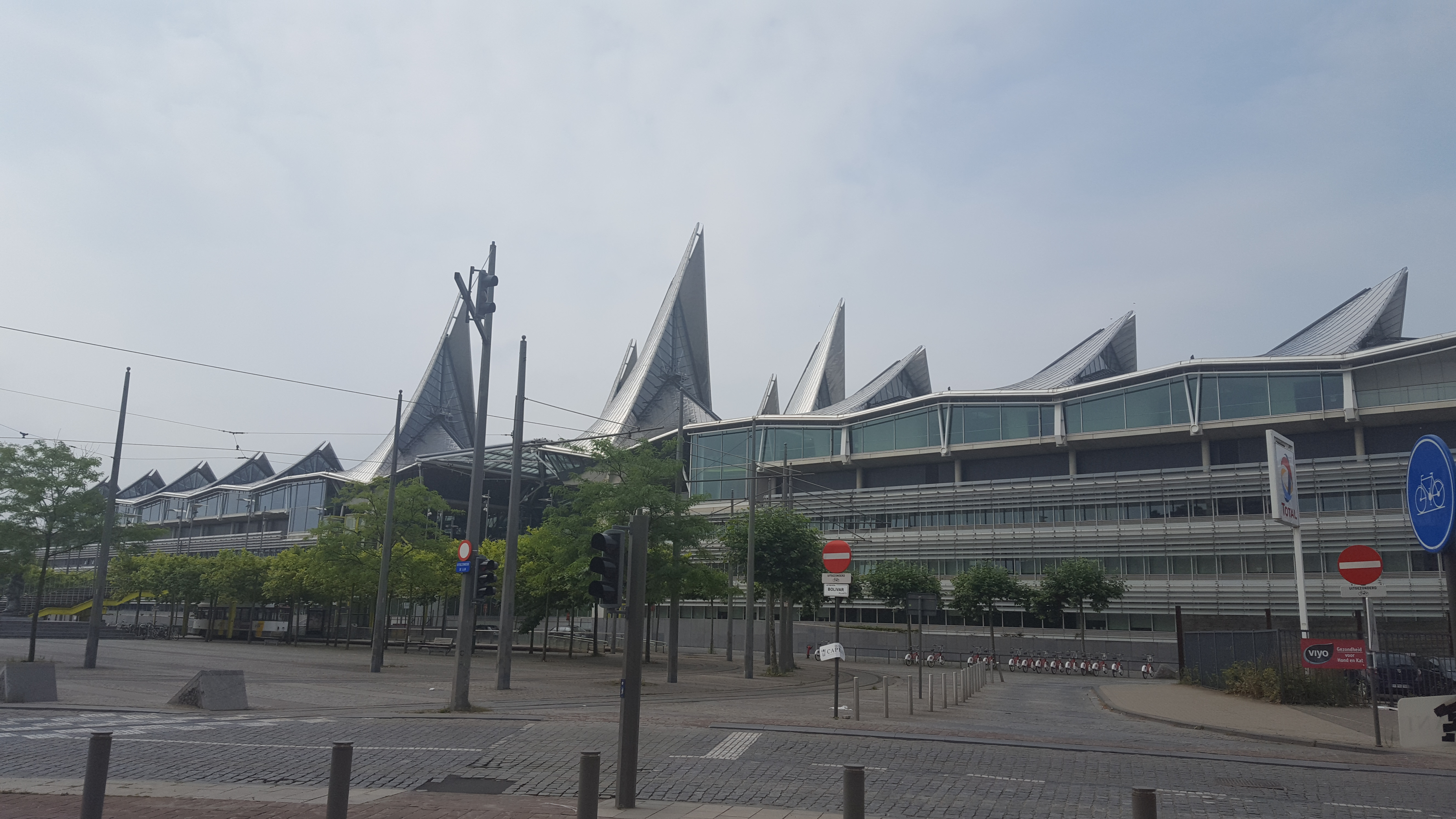 Gerechtsgebouw aan de Bolivarplaats, Antwerpen, België